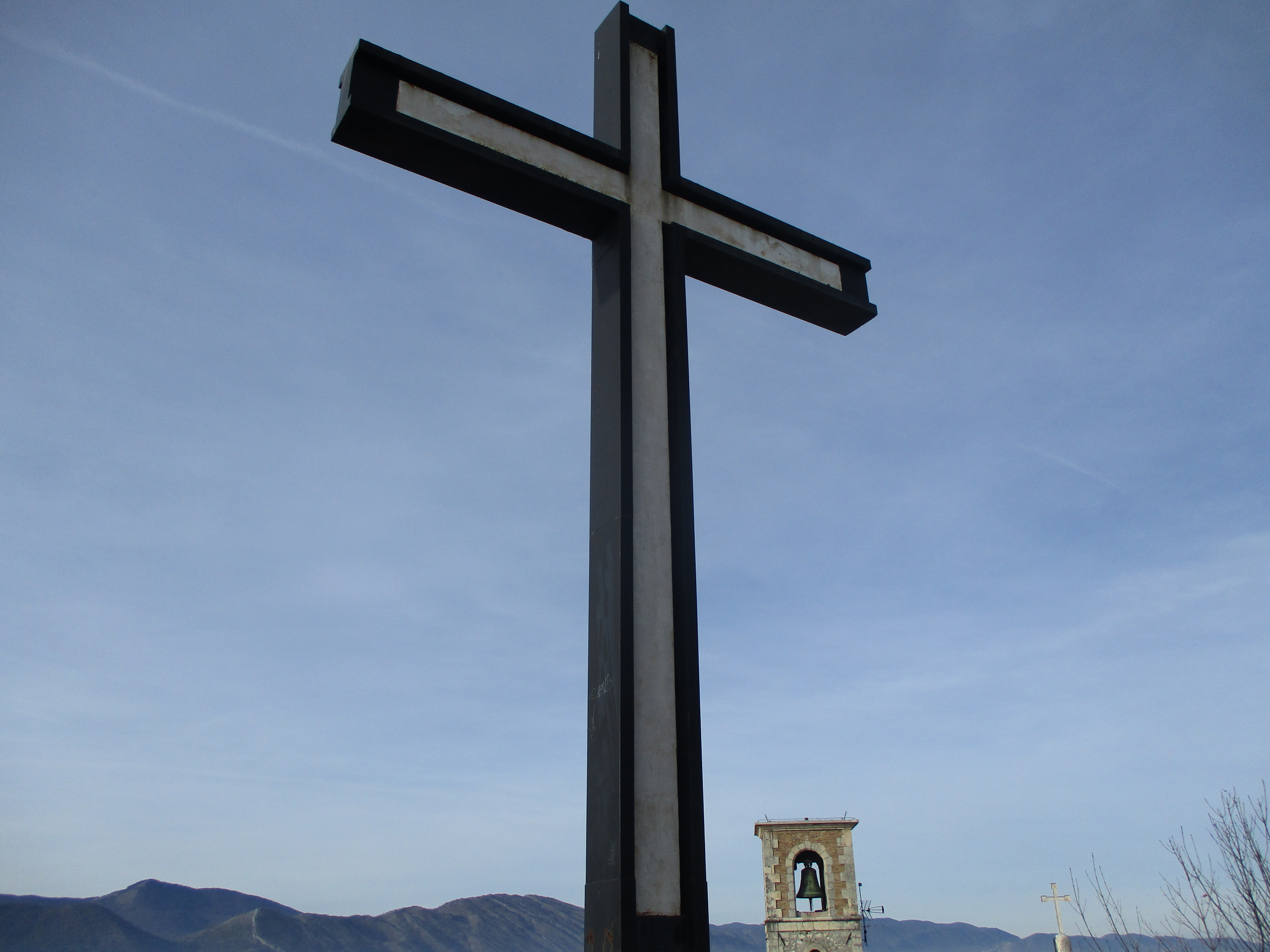 La grande croce